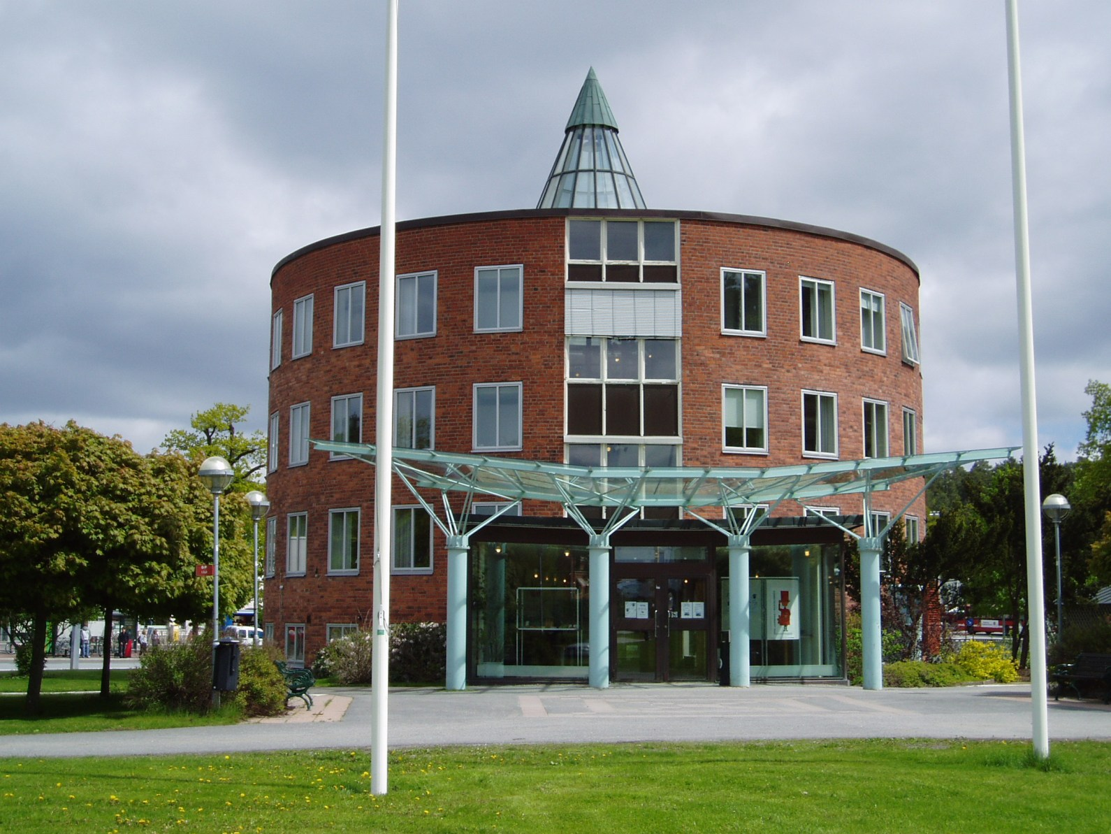 Gustavsberg, Runda huset